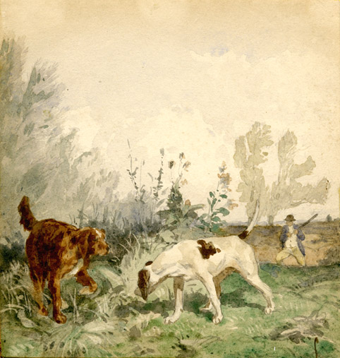 « Chiens de chasse » (Hounds tracking the game) peinture d'Evariste-Vital Luminais (Nantes, 1822 - Paris, 1896). 6 1/8 x 5 7/8 pouces. Pennsylvania Academy of Fine Arts.